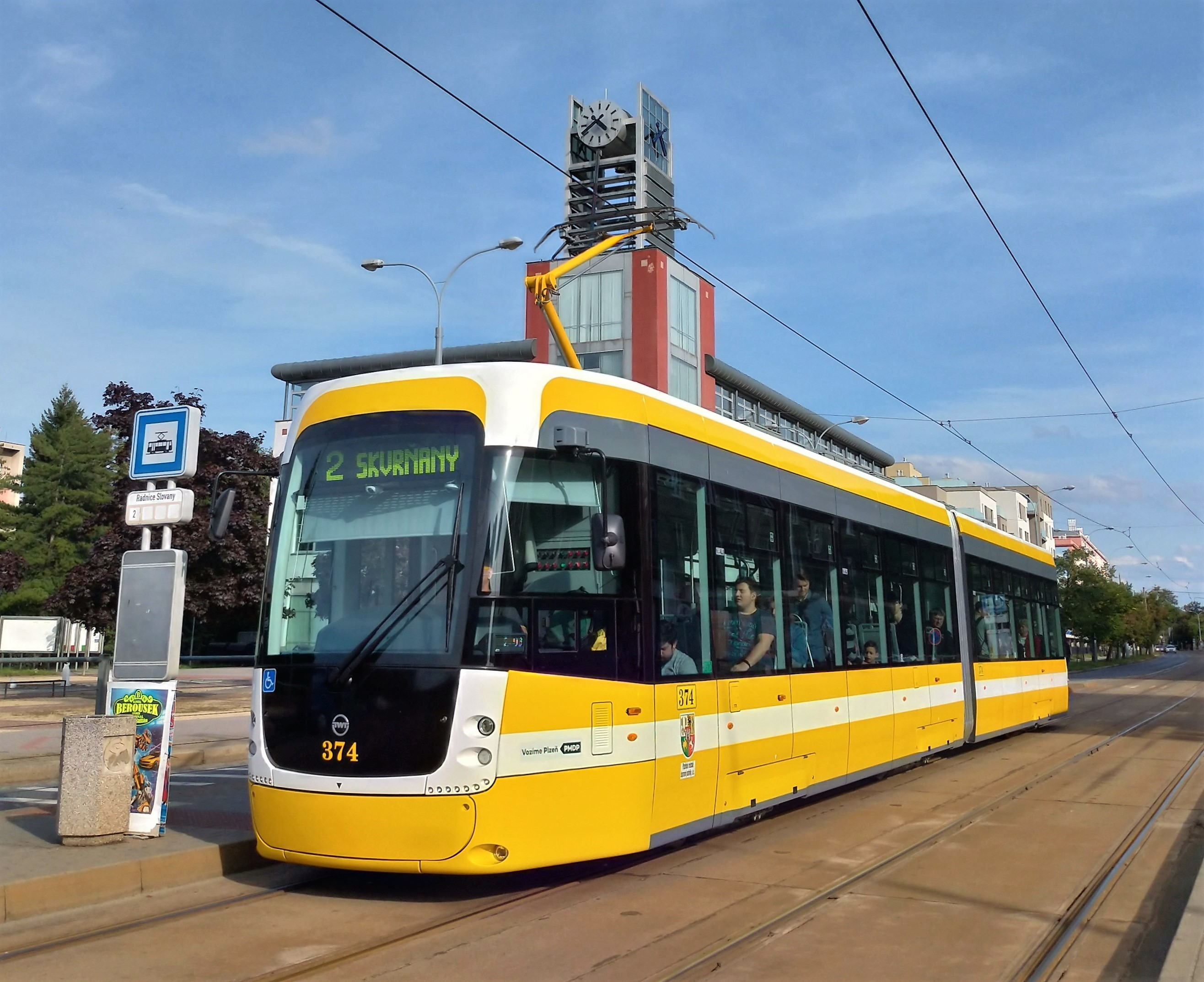 tramvaj Evo 2 evč. 374 v Plzni.